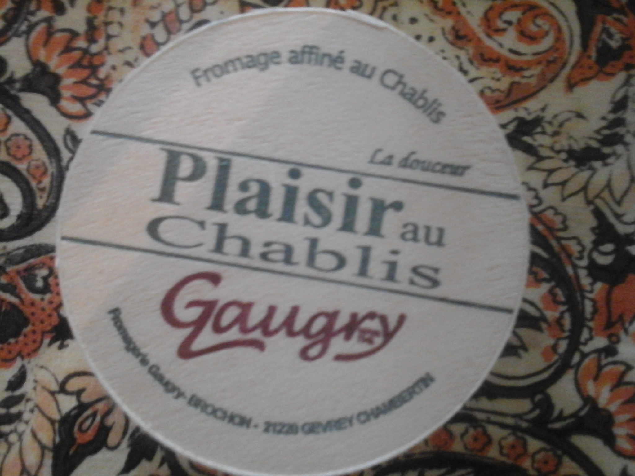 Fromage Plaisir au chablis. Fromage à pâte molle au lait pasteurisé. Brochon (Côtes-d'Or).